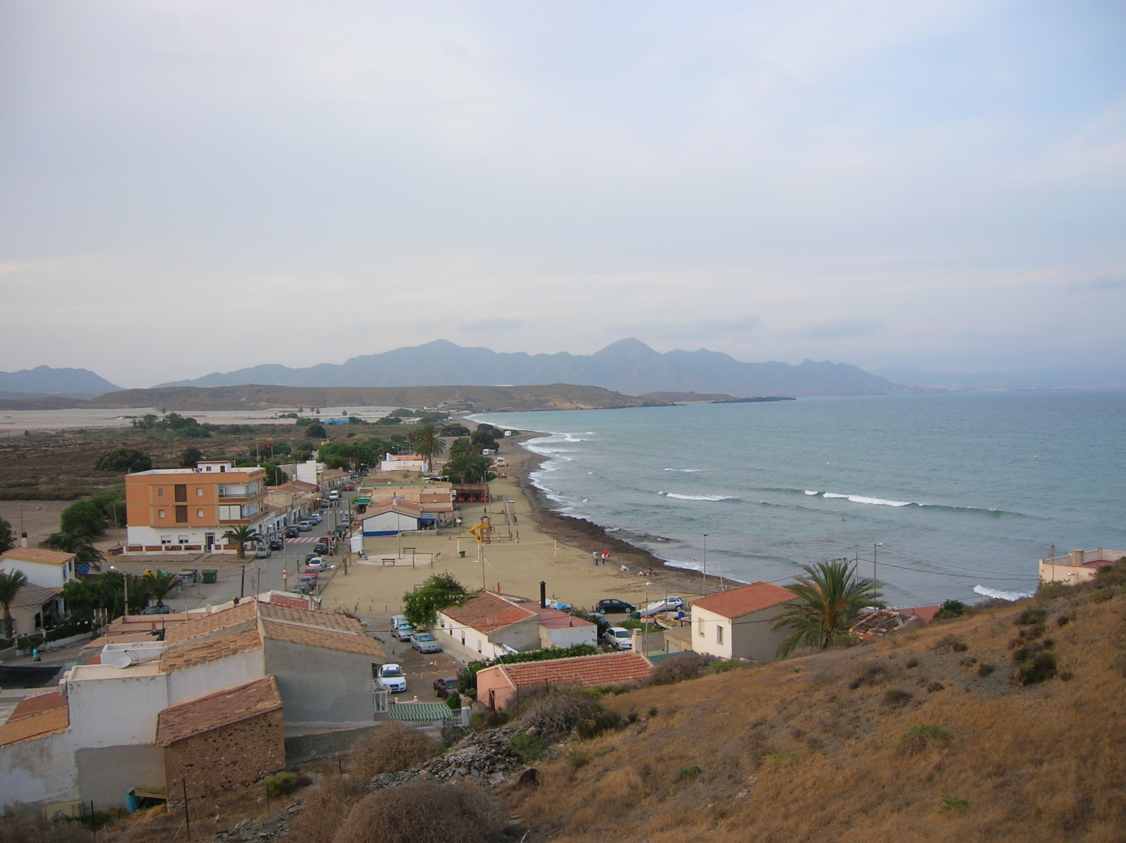 Vista general de la playa de Calnegre, Lorca (Murcia)